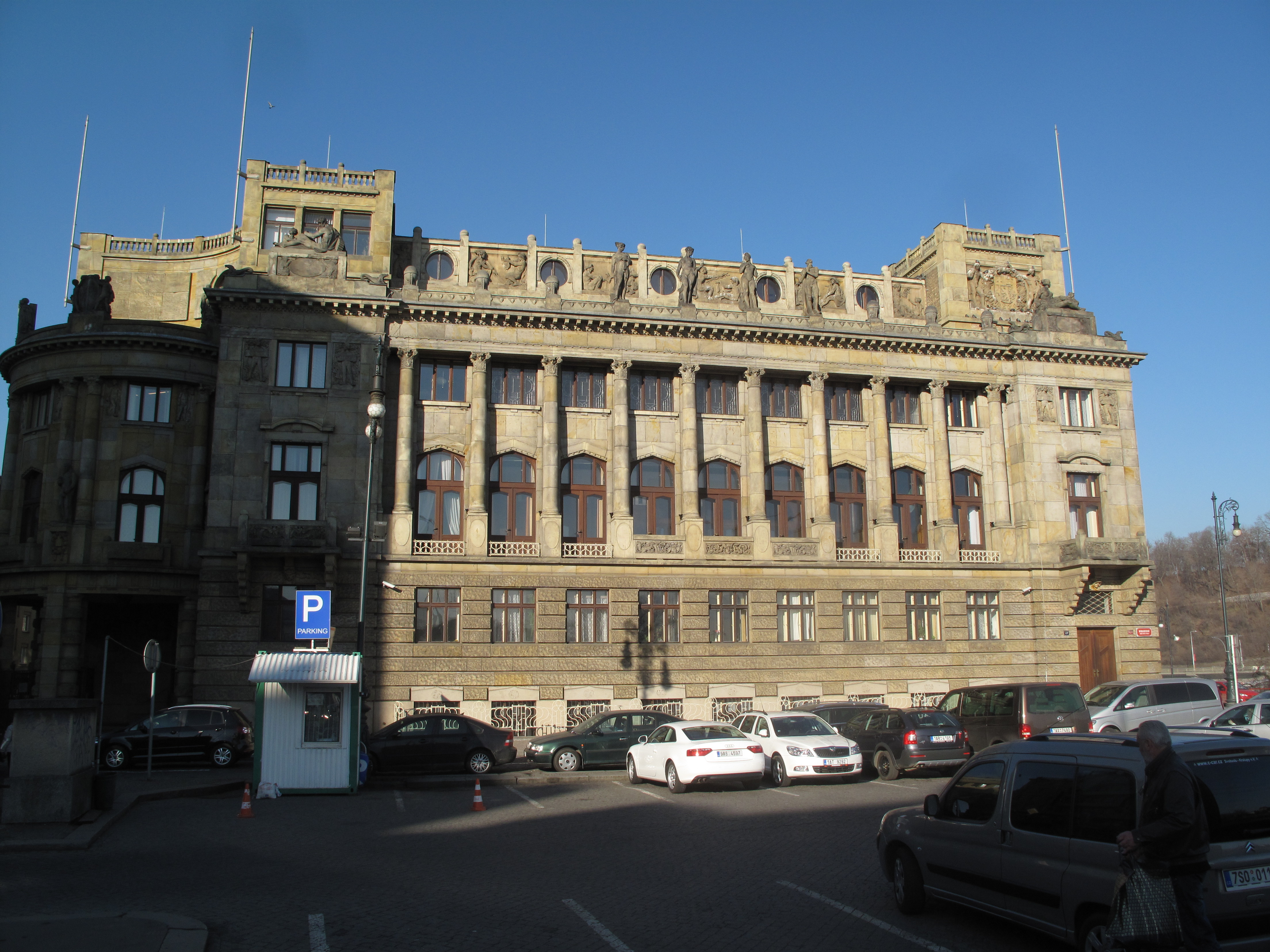 Ministerstvo průmyslu a obchodu České republiky